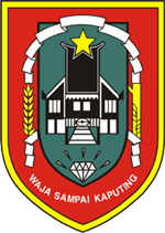 Lambang Provinsi Kalimantan Selatan